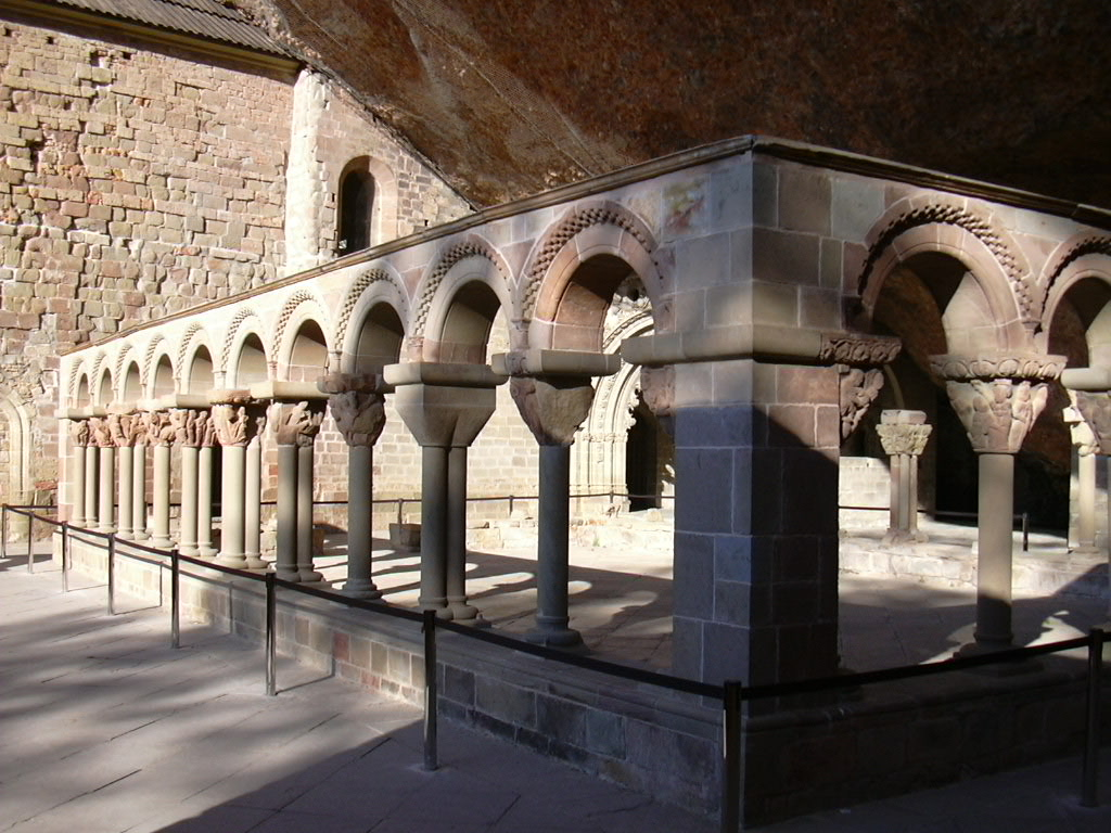 Monasterio de San Juan de la Peña en la provincia de Huesca (España)